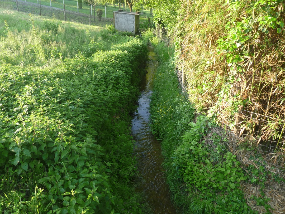 Le Tâtre au pied du bourg du Tâtre (Charente, France)